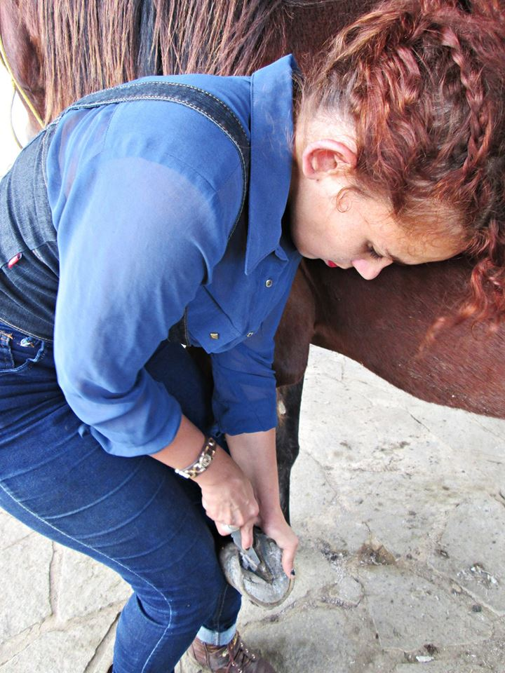 Técnica em agropecuária casqueando potro no Haras Arizonas Reunidas, Itabela-Bahia